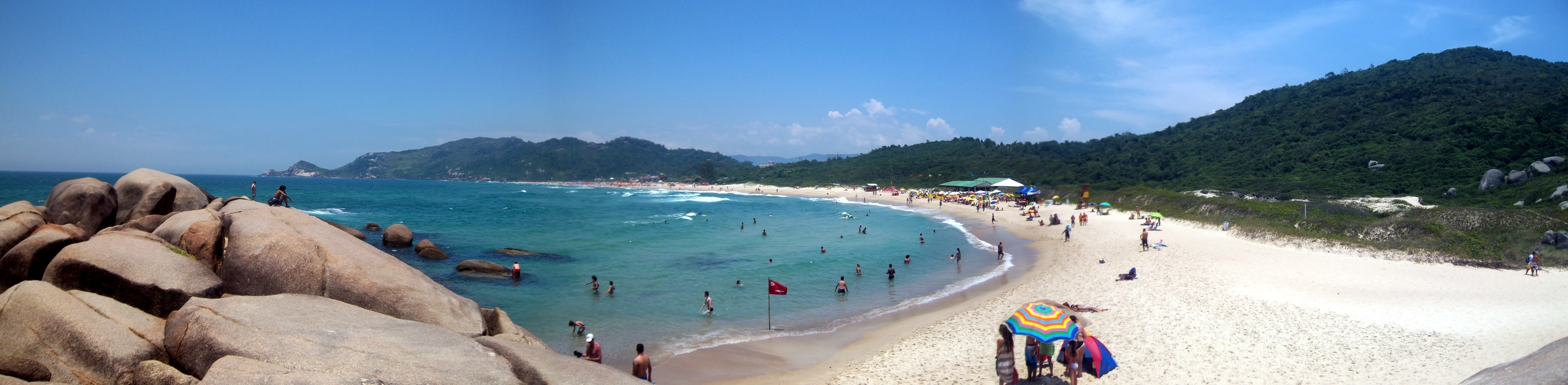 Praia Mole - Florianópolis - Brasil